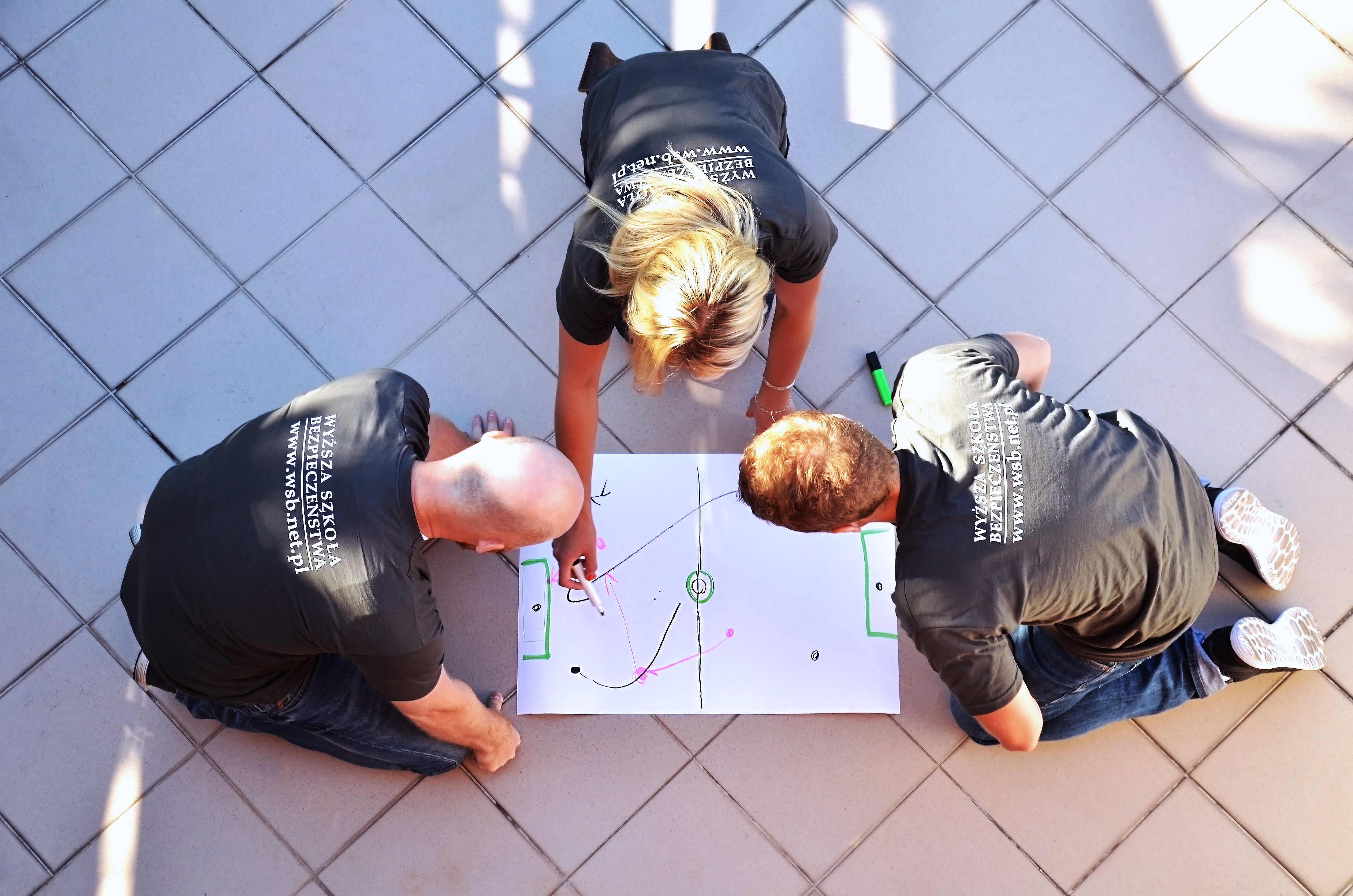 wsb ludzie